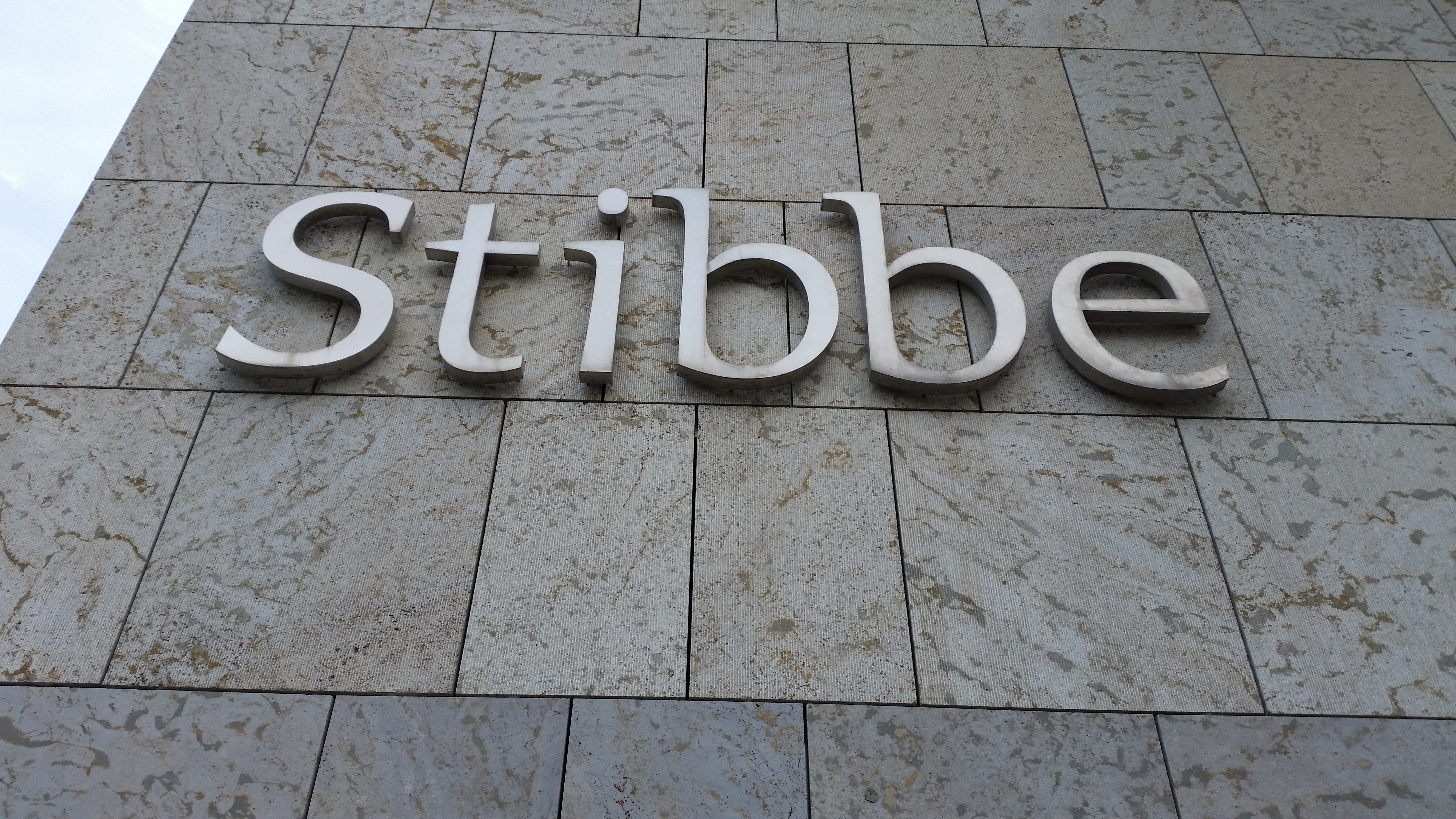 Bedrijfslogo Stibbe op muur Beethovenplein 10, Amsterdam